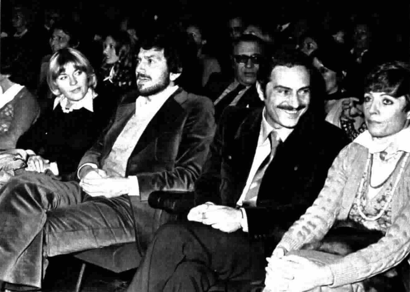 Italian actors Gigi Proietti and Nino Manfredi attend a concert of Ornella Vanoni at the Teatro Olimpico in Rome